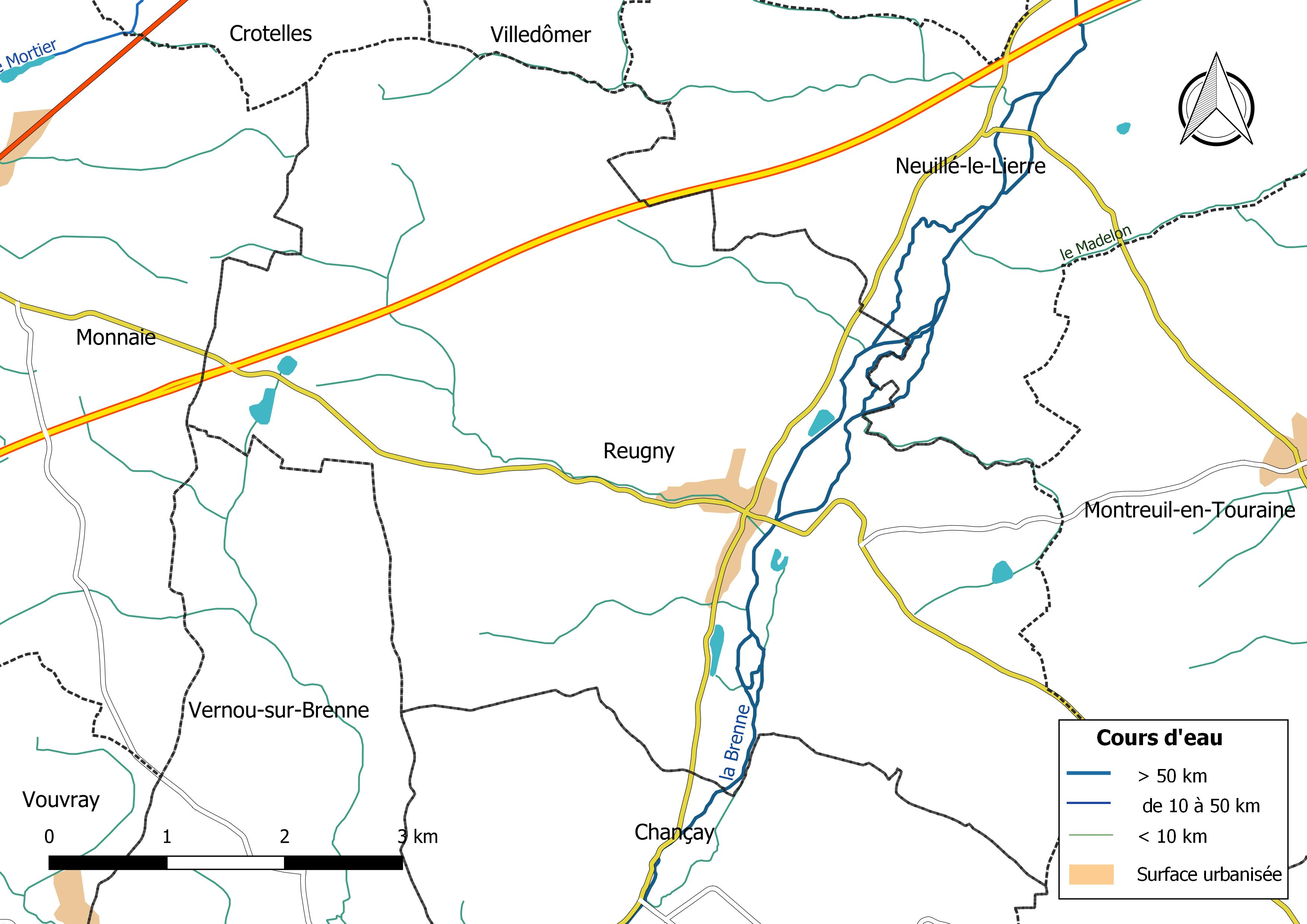 Carte du réseau hydrographique de la commune de Reugny (Indre-et-Loire) (France).